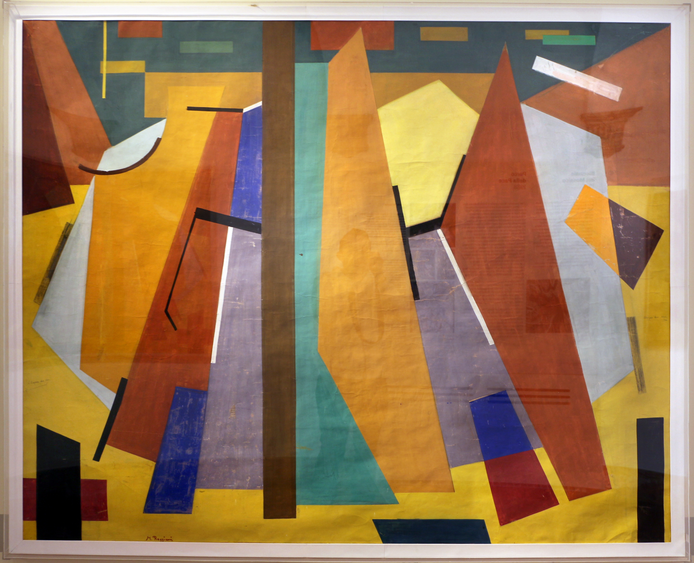 Collezione Mosaici Moderni - NB: Museum explicitly authorized the upload of its contemporary art collection for WLM 2016 (for further info ask WLM Italy organizators). This is a photo of a monument which is part of cultural heritage of Italy.